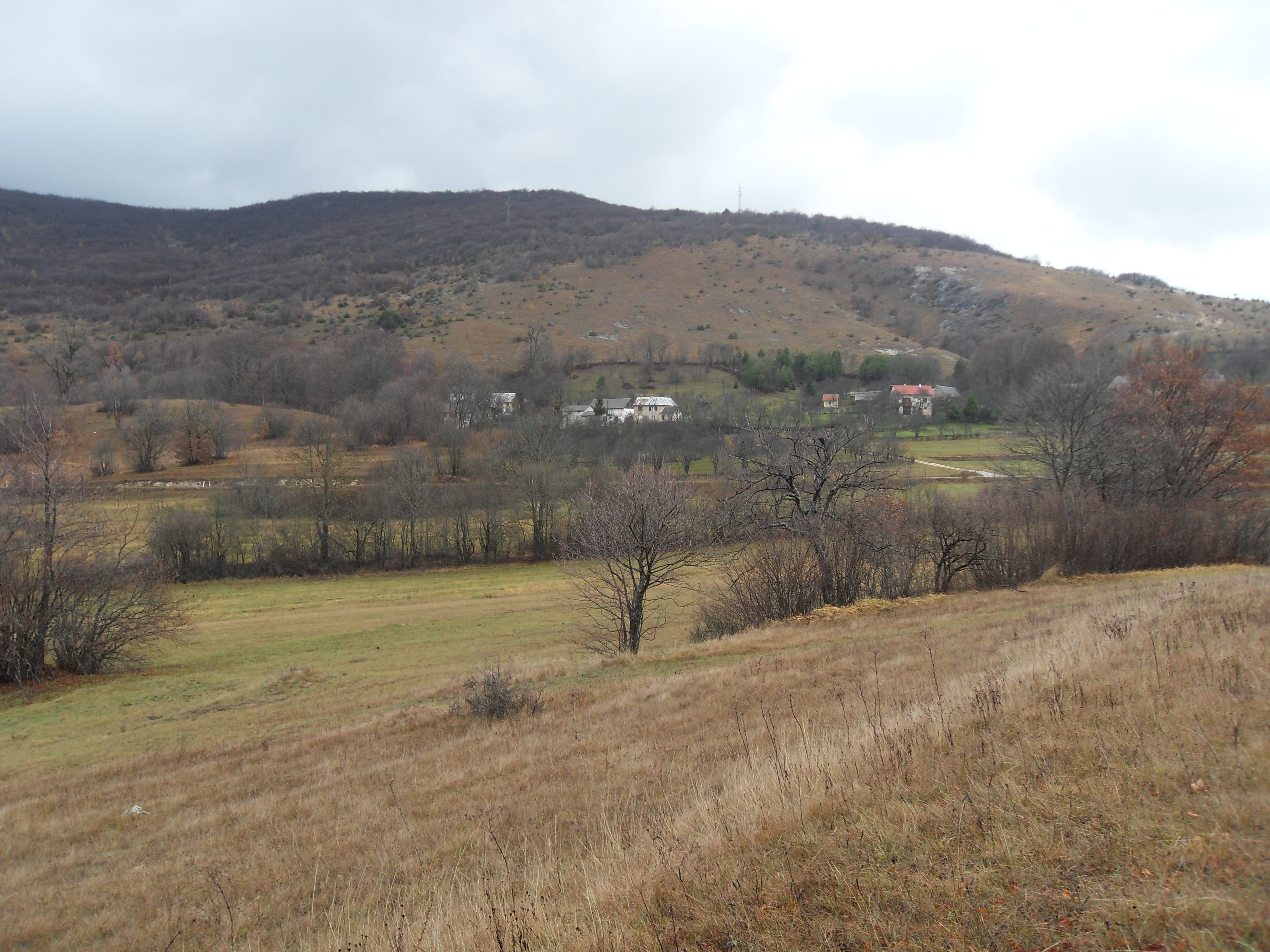 Vrpile, općina Plitvička Jezera Lika, Hrvatska/Croatia